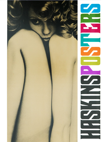 Titelbild des Bildbandes Haskins Posters